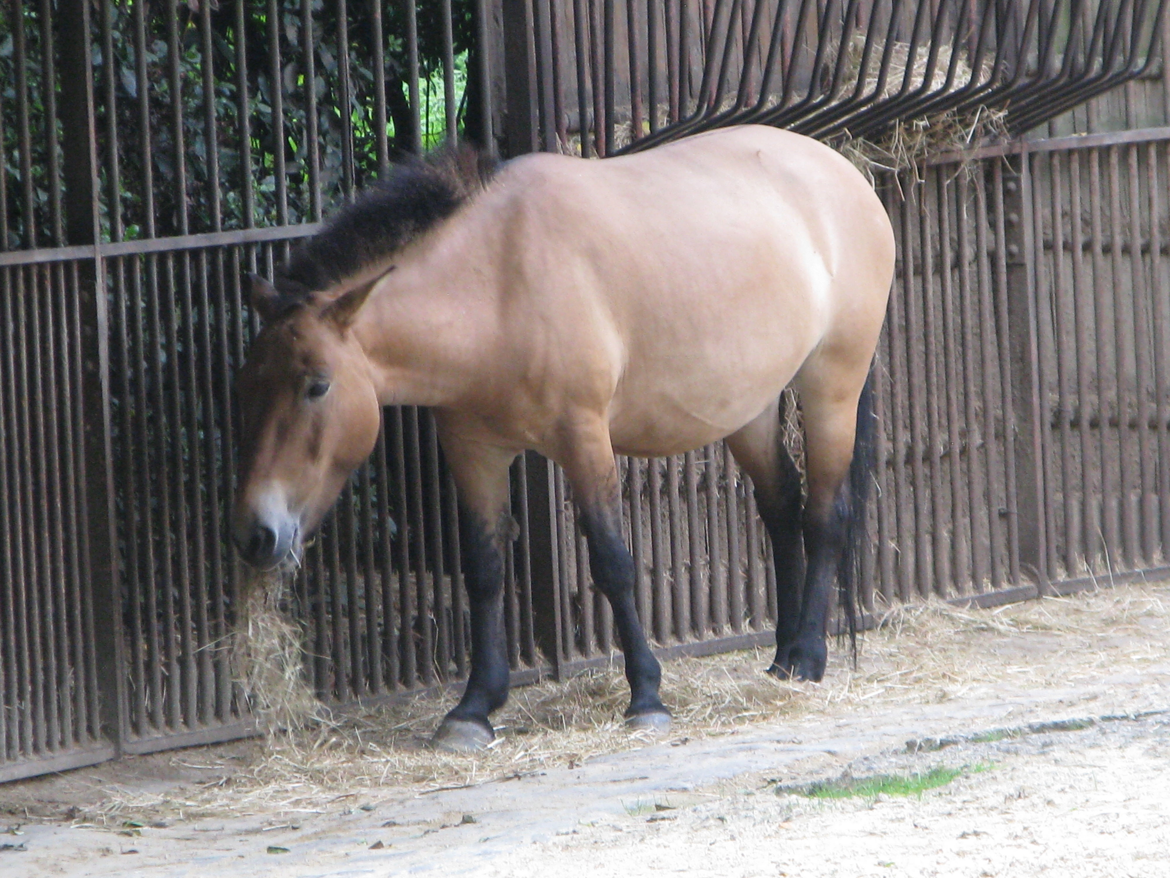 Cheval de Przewalski (equus ferus przewalskii) à la ménagerie du Jardin des plantes de Paris.